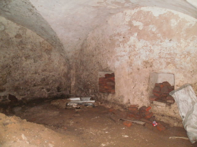 II keldrikorrusel asuva põhjapoolse ristvõlviga ruumi kirdenurk. Idaseinas on niššid.